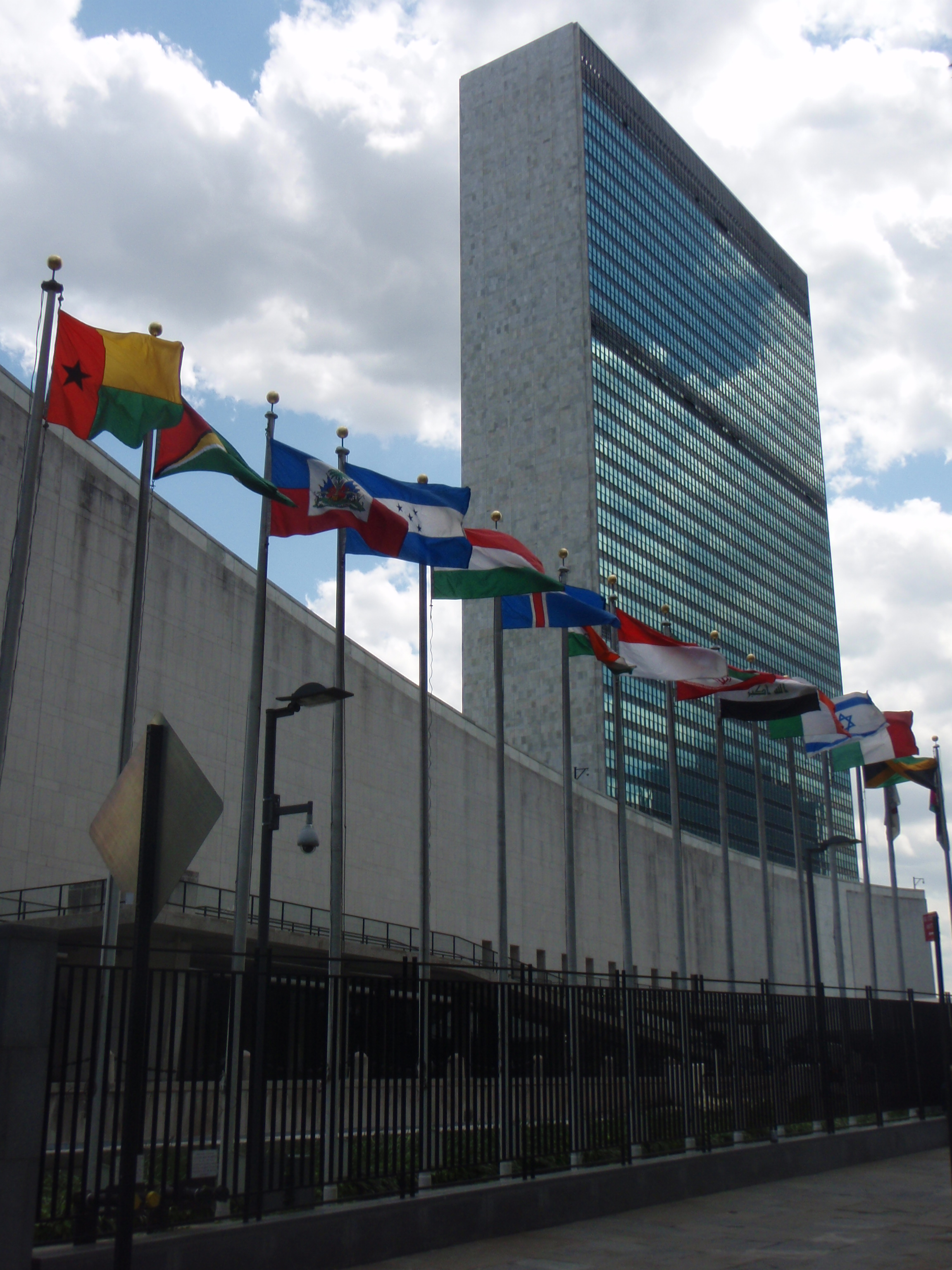 FN i New York